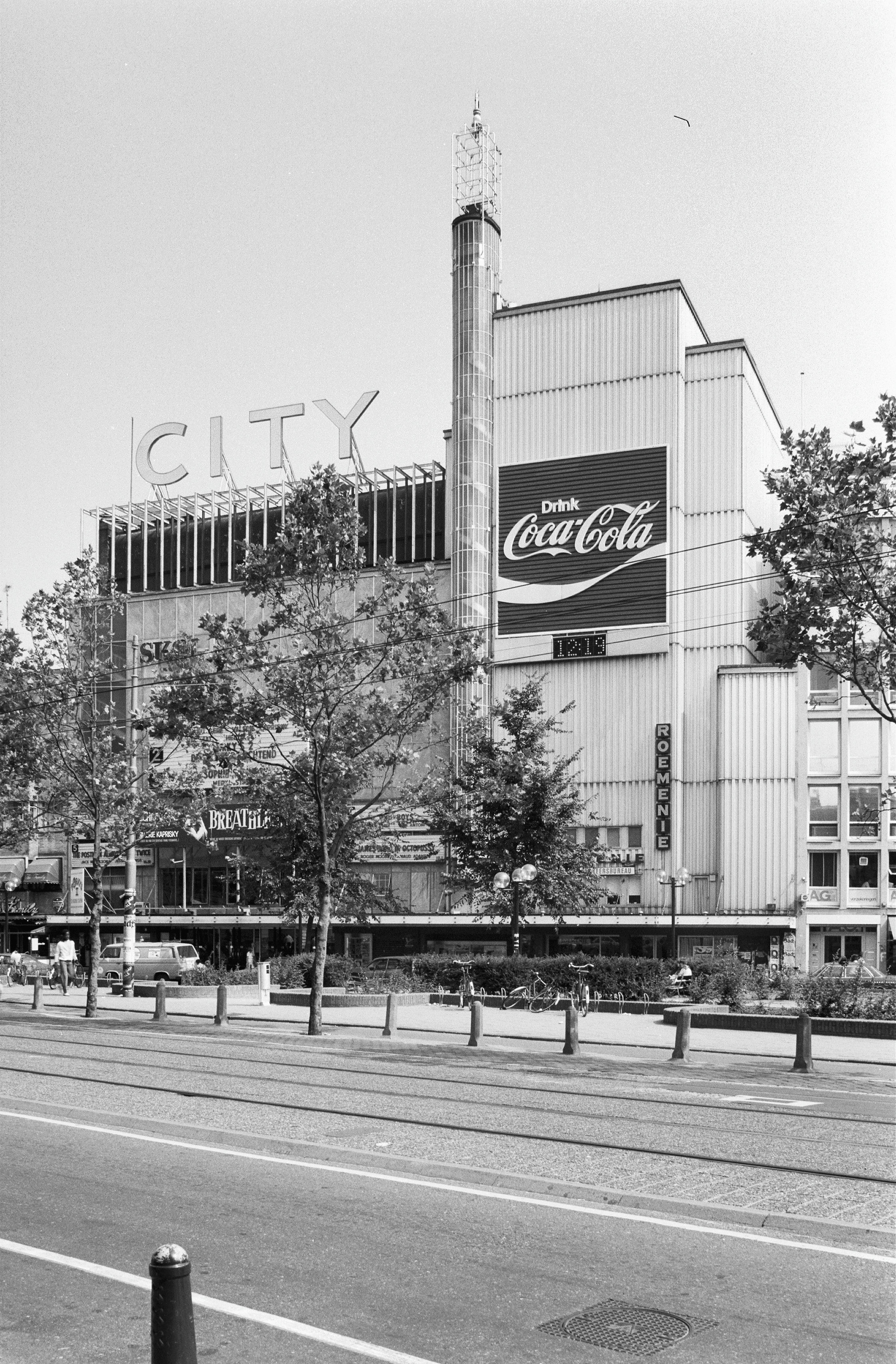 voorzijde City Theater 1934